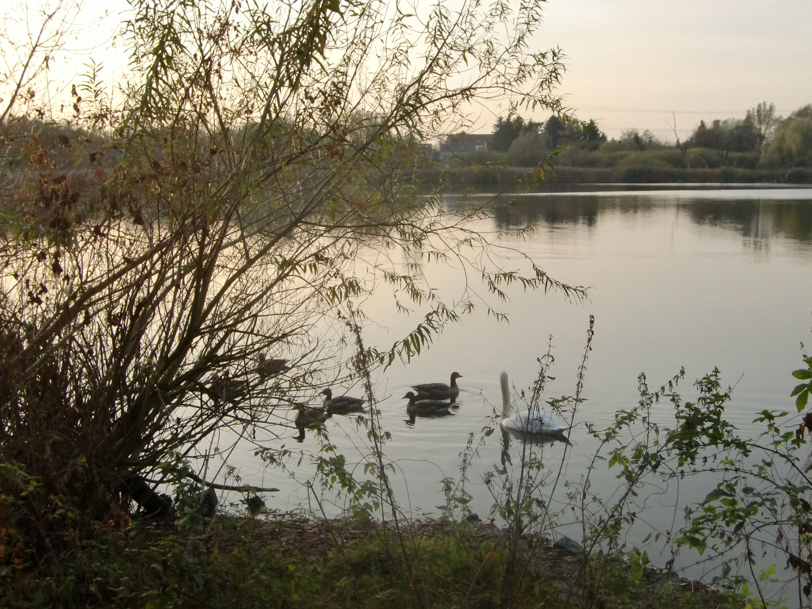 Entenfamilie und Schwan am herbstlichen Malchower See